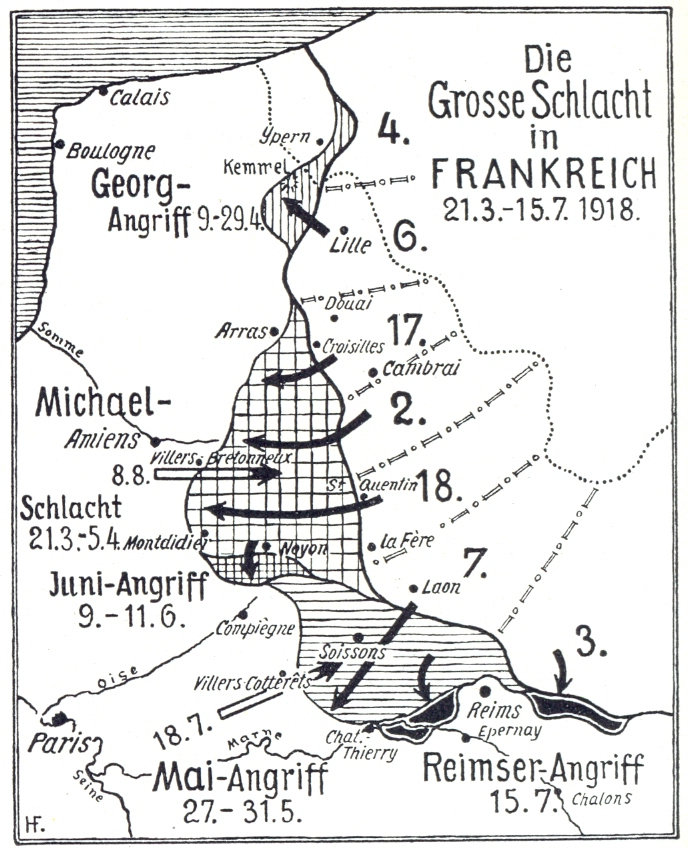 Karte: Die Grosse Schlacht in Frankreich, Operation Georg, Operation Michael, Mai-Angriff, Juni-Angriff, Reimser Angriff